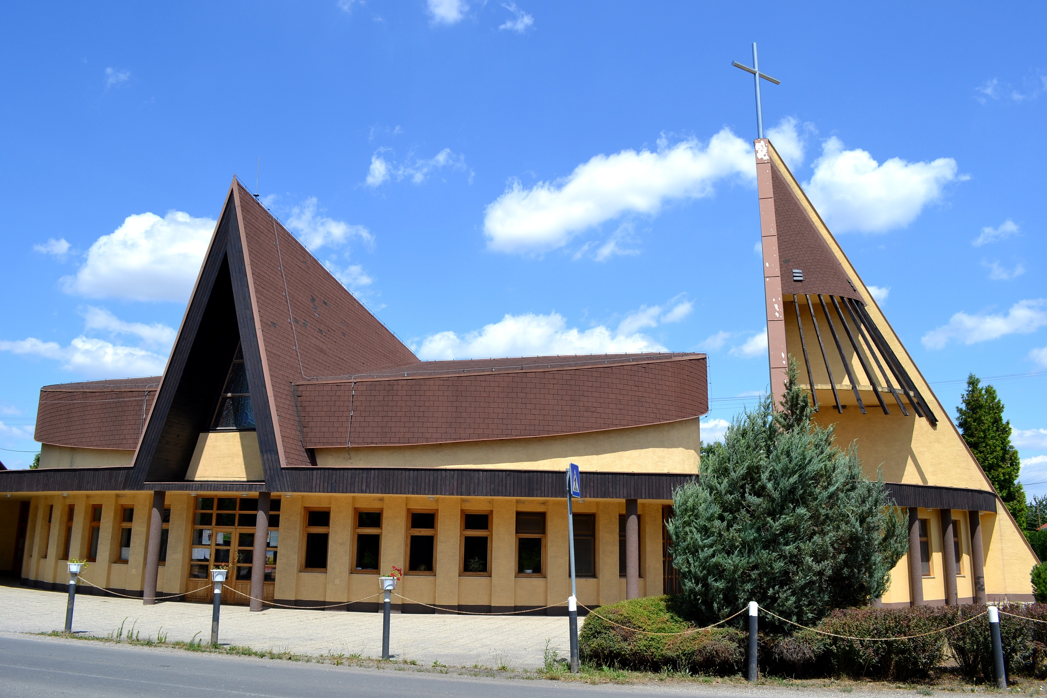 Miloslavov (okr. Senec), Kostol Božieho milosrdenstva v miestnej časti Alžbetin Dvor